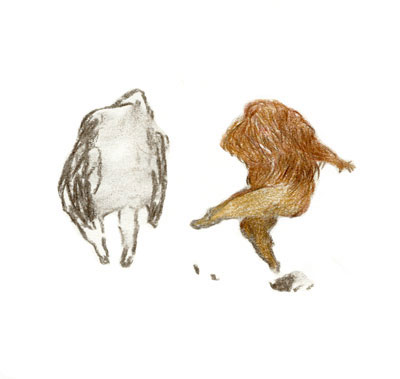 Dessin technique mixte